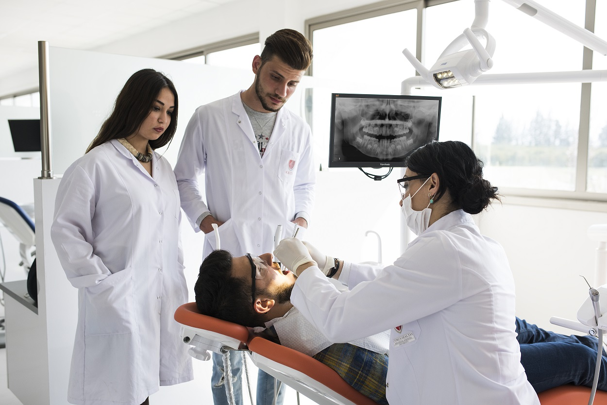 Kıbrıs Sağlık ve Toplum Bilimleri Üniversitesi Diş Kliniği